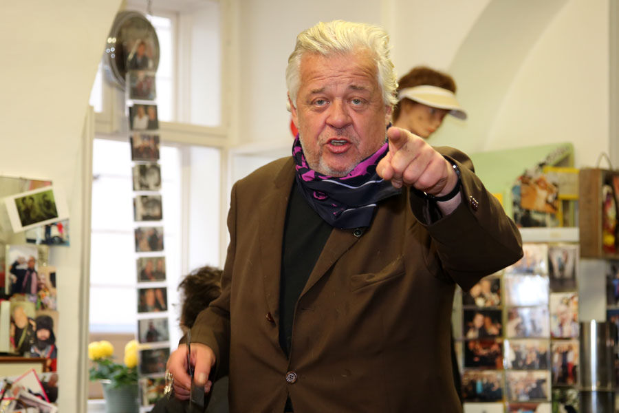 Erich Joham-8999